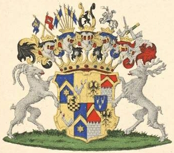 Stenbock-Fermori suguvõsa krahvivapp